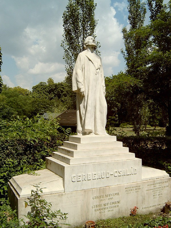 Gerbeaud Emil (Genf, 1854. február 22. – Budapest, 1919. november 9.) cukrász, csokoládégyáros és családjának sírja Budapesten. Kerepesi temető: 26-1-4 [szobrász: Horvay János].